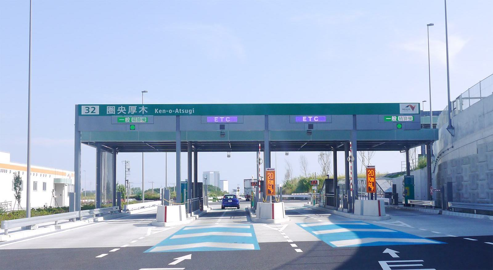 圏央道圏央厚木IC